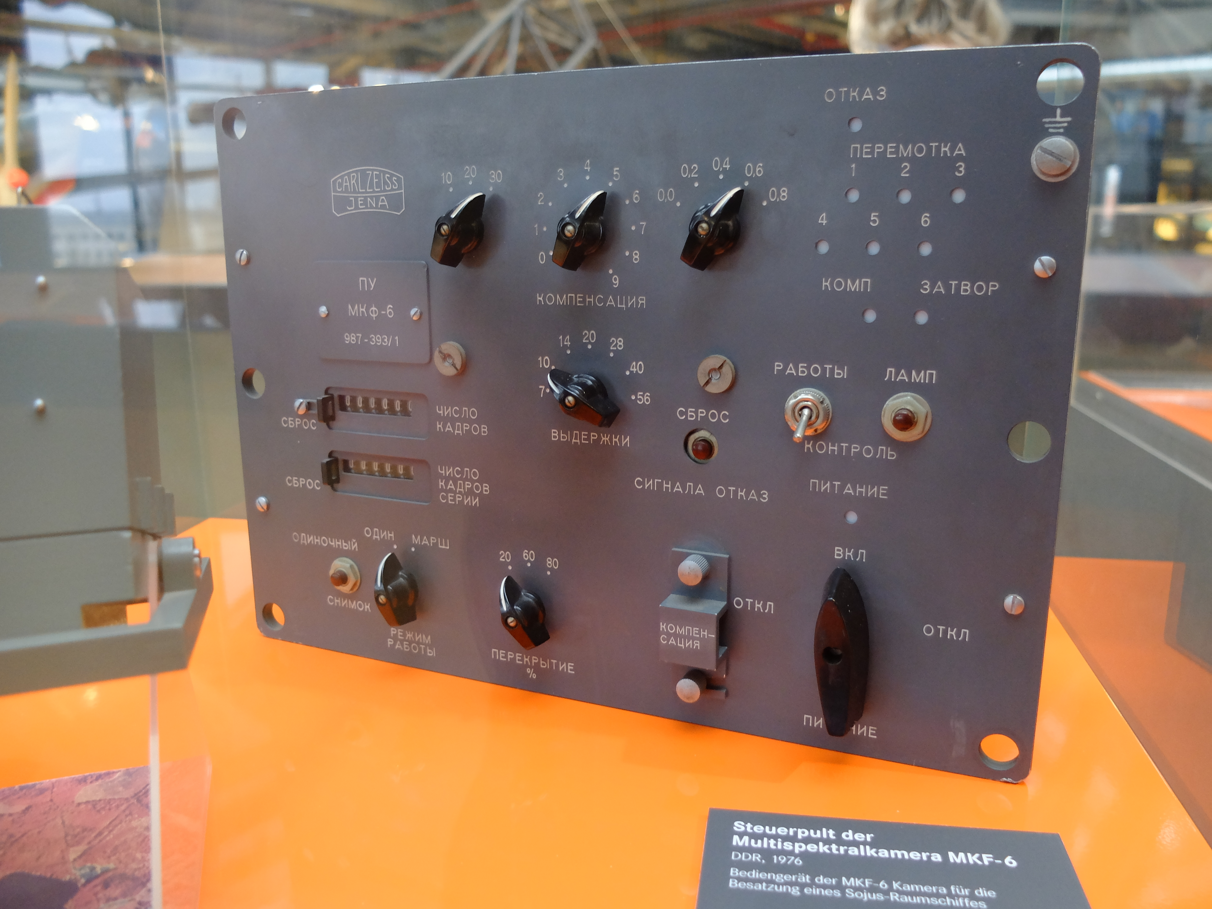 Bediengerät der MKF-6 Kamera von Carl Zeiss Jena zur Bedienung durch die Besatzung eines Sojus-Raumschiffs. Ausgestellt in der Sonderausstellung "40 Jahre Deutsche im Weltall" im Technikmuseum, Berlin